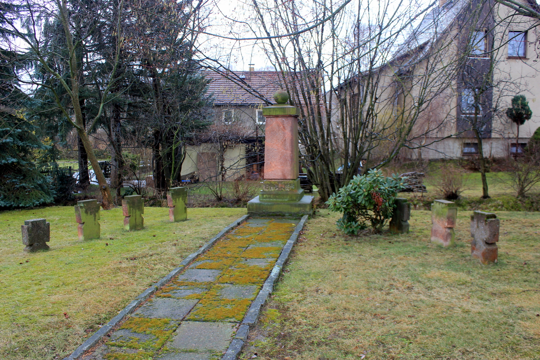 Hornjoserbsce: Wojerski pomnik za padłych Prěnjeje swětoweje wójny we Wudworje.